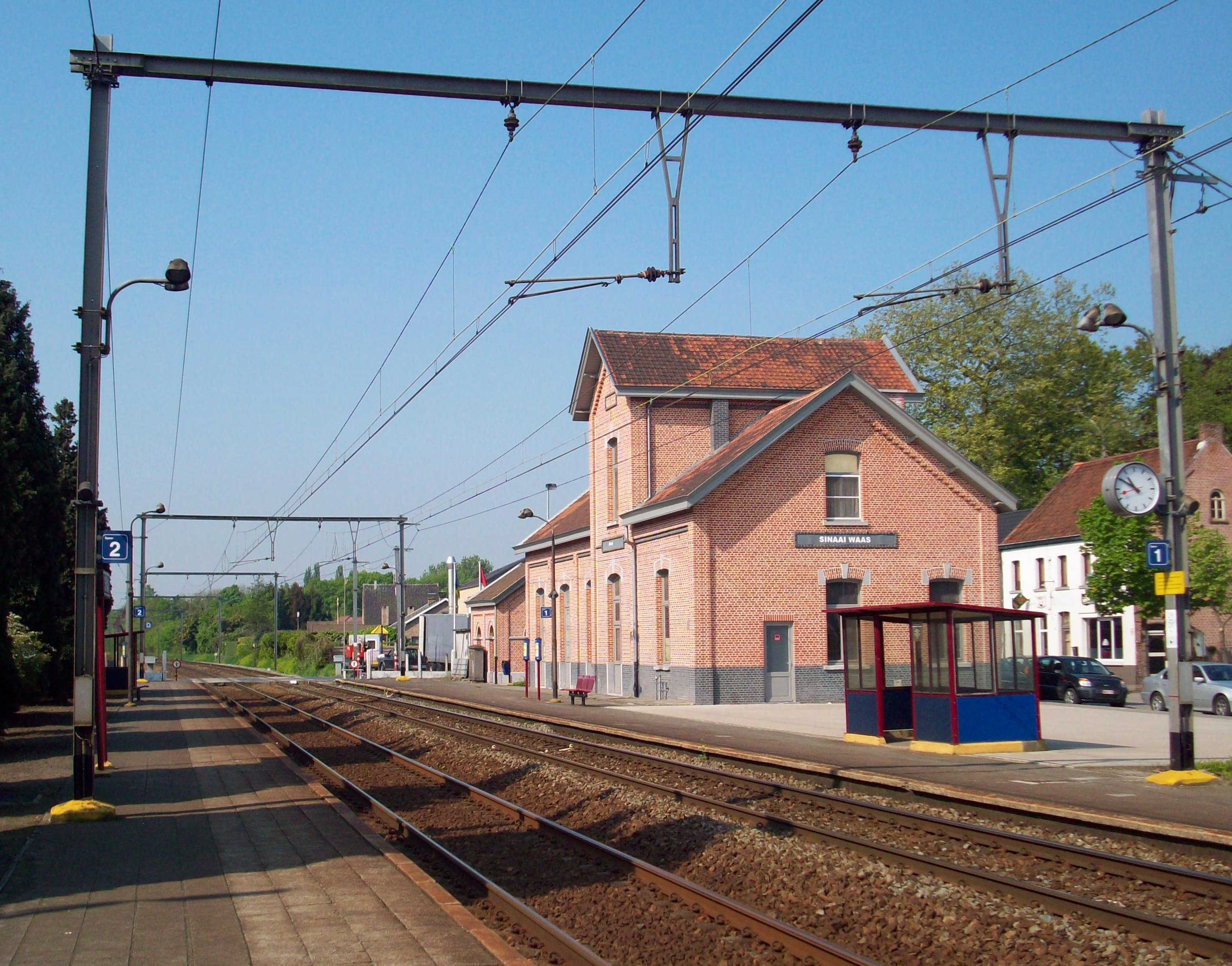 Station Sinaai